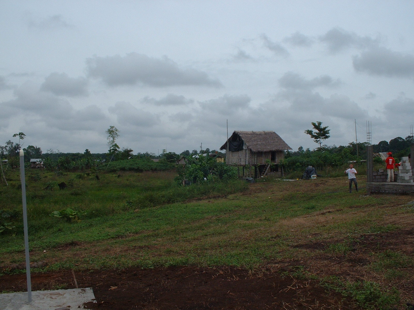 Zelf genomen foto in Nueva Jerusalén.